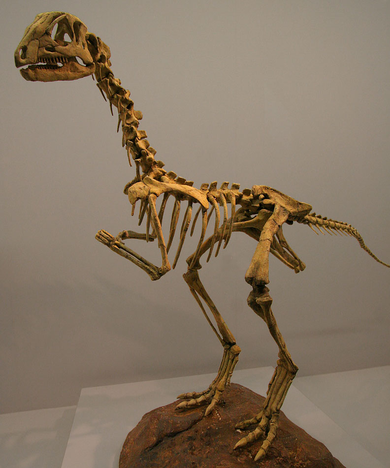 Anabisetia - 01